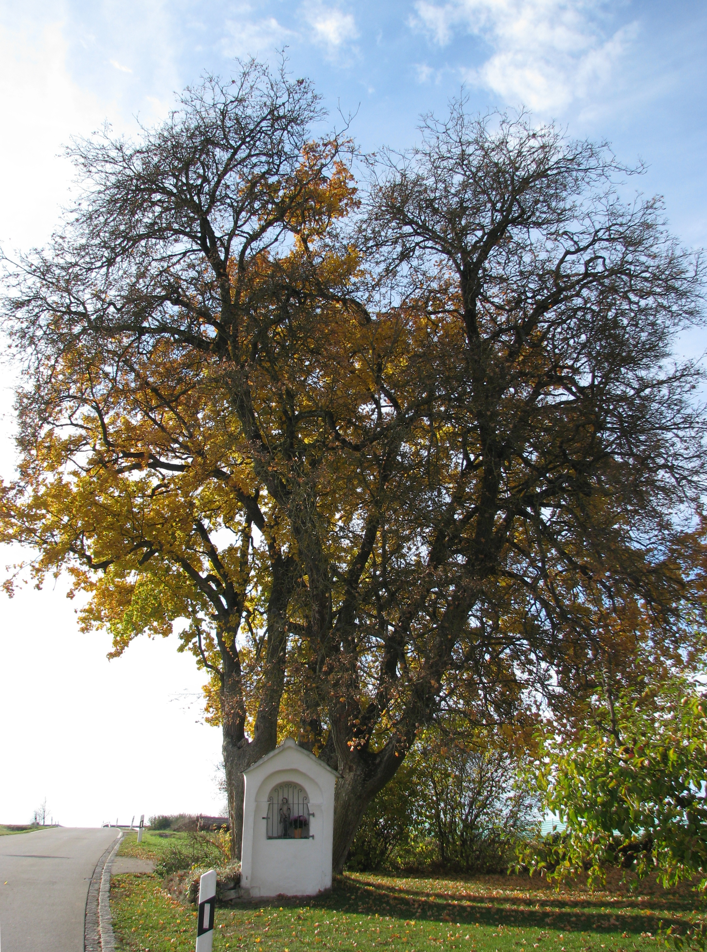 Herrnsberg, Ortsteil von Greding im mittelfränkischen Landkreis Roth in Bayern, Feldkapelle